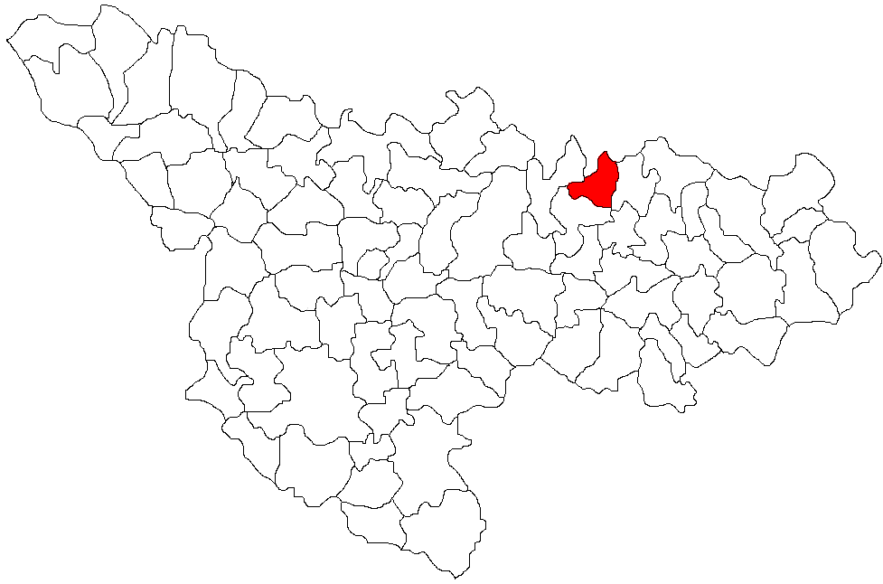 Categorie:Hărţi ale judeţului Timiş